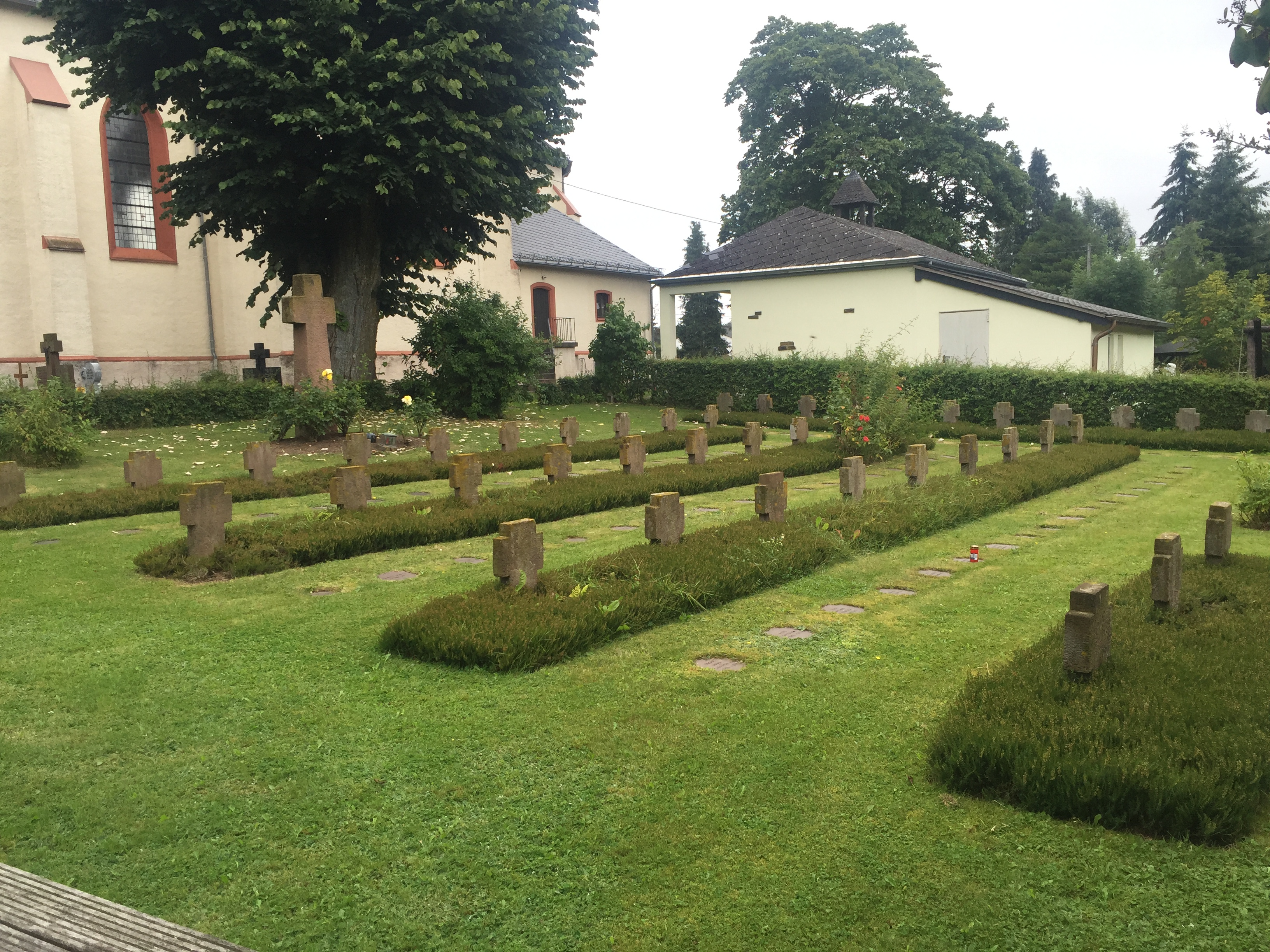 Cementerio militar alemán en Echfeld